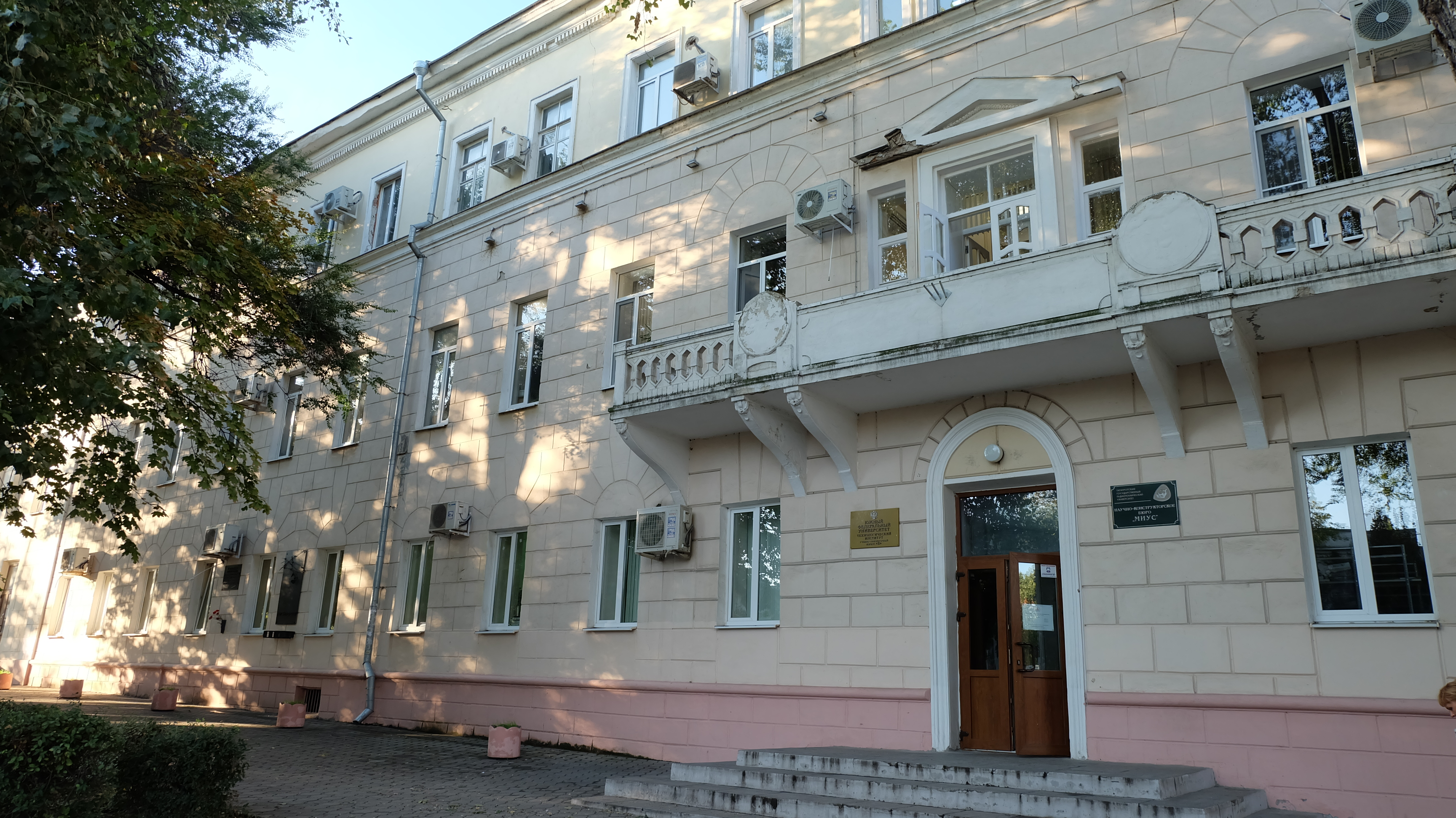 Здание гостиницы "Европейская". Здесь белогвардейцами было замучено 12 красногвардейцев. Комплекс застройки Петровской улицы: улица Ленина, 81, Таганрог, Ростовская область